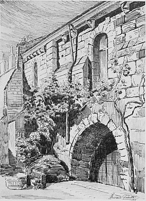 Face sud de la chapelle Saint-Libert, dessin d’Armand Guéritte de 1898 (Fonds SAT DF Ab 026-011)